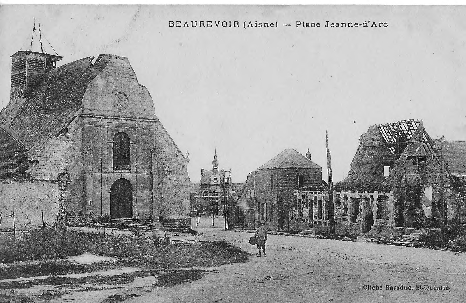 Le village détruit en 1918.